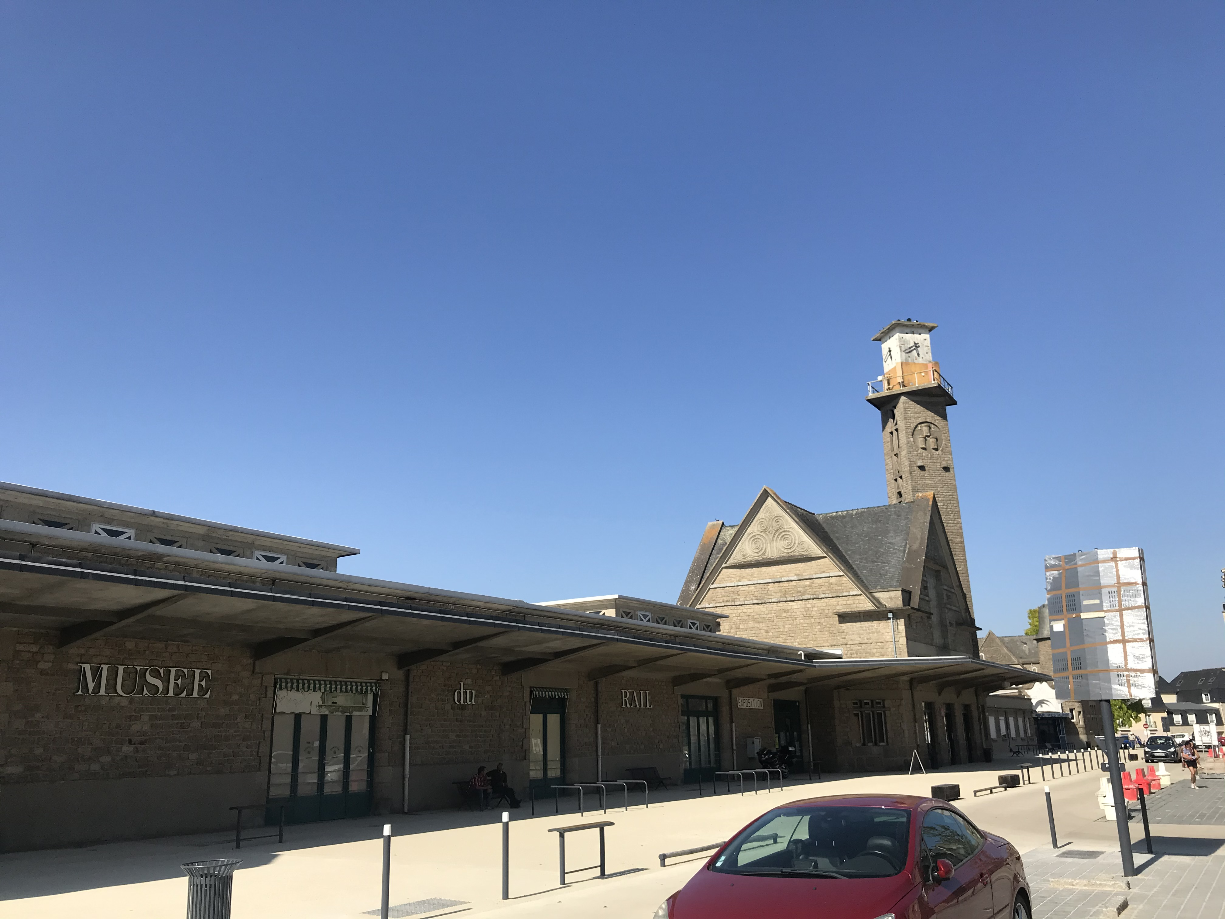 le bâtiment voyageur de la gare de Dinan (22)